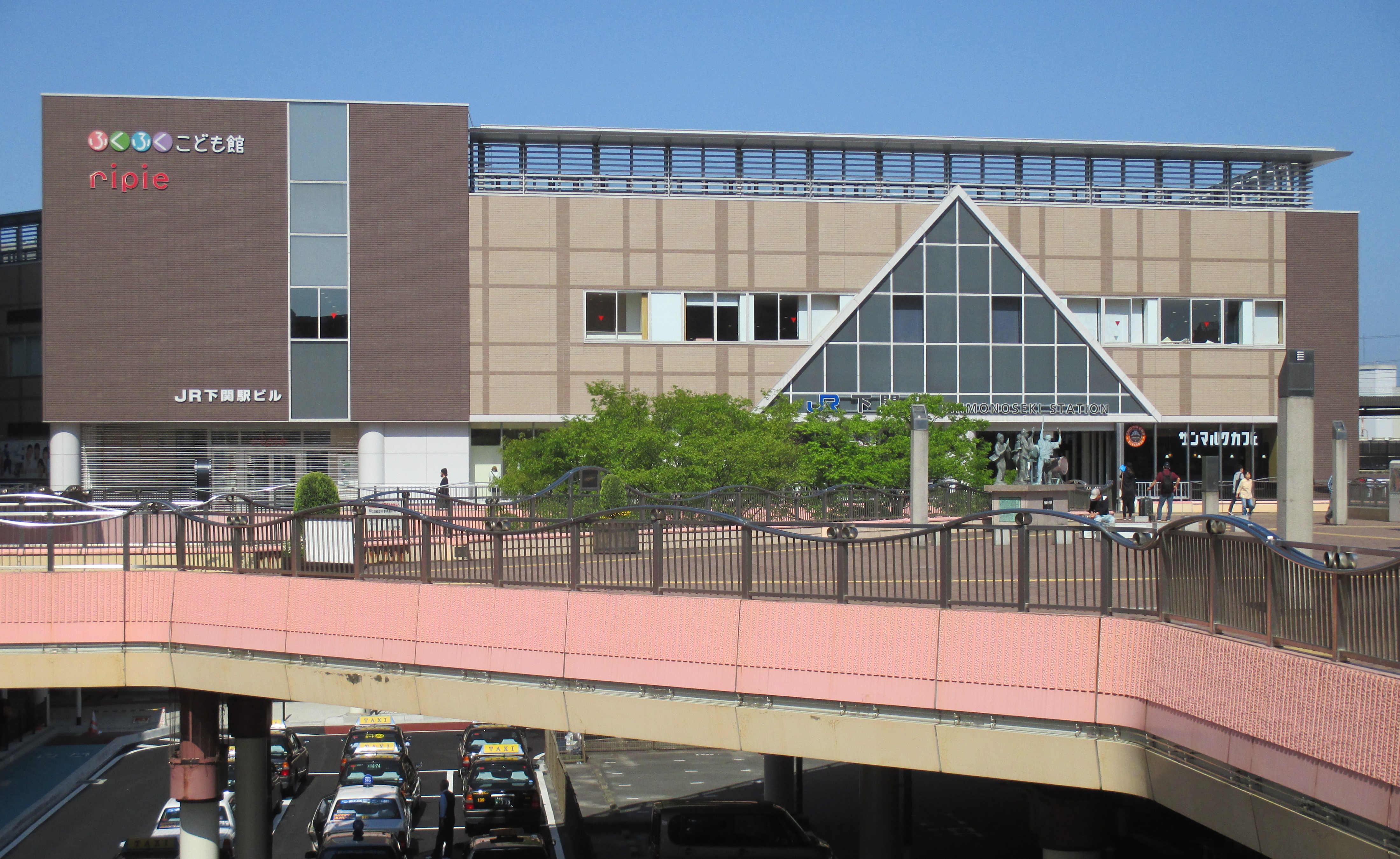 下関駅ビルripie